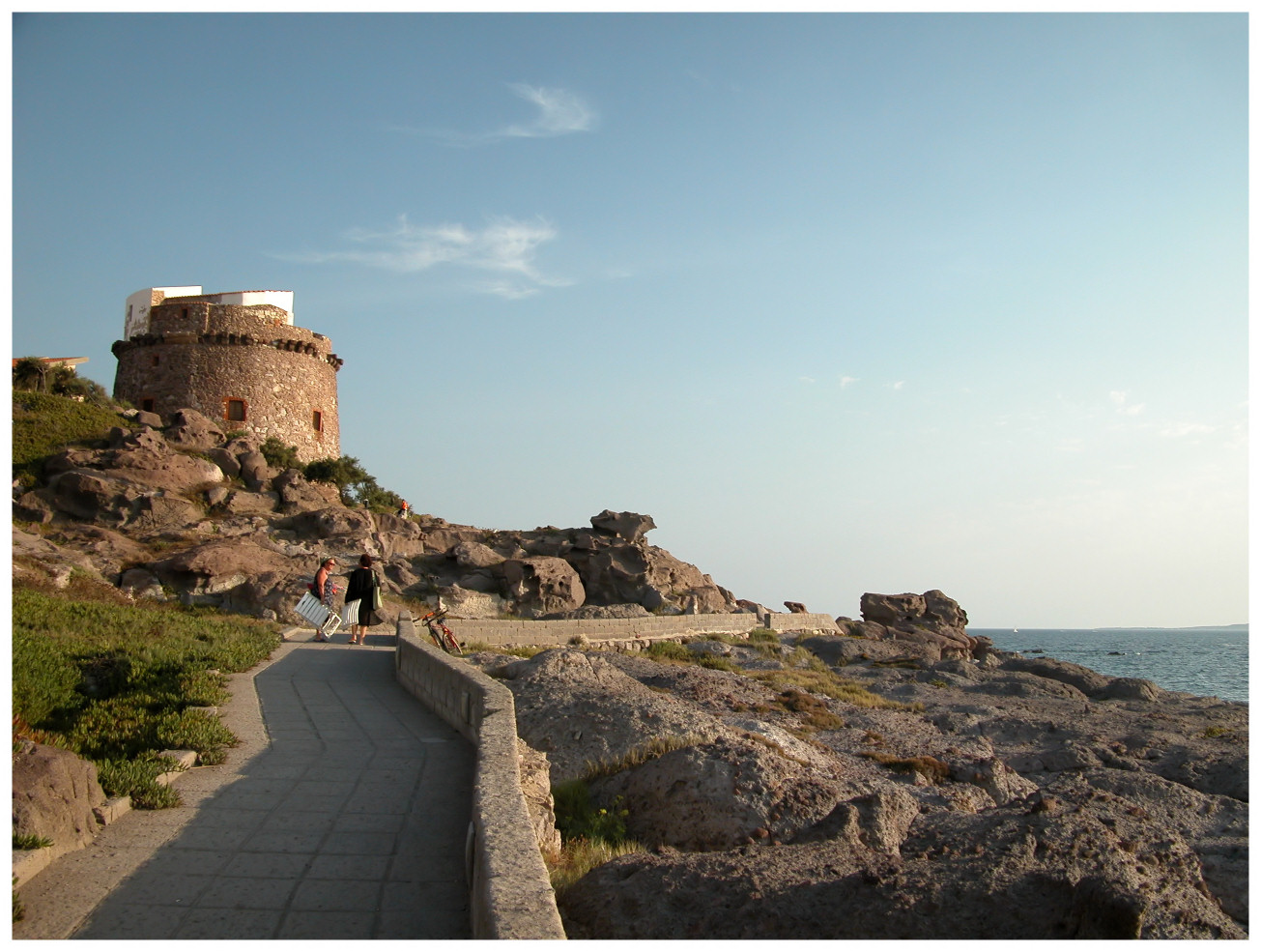 La Torre Spagnola di Portoscuso. Foto da me realizzata.